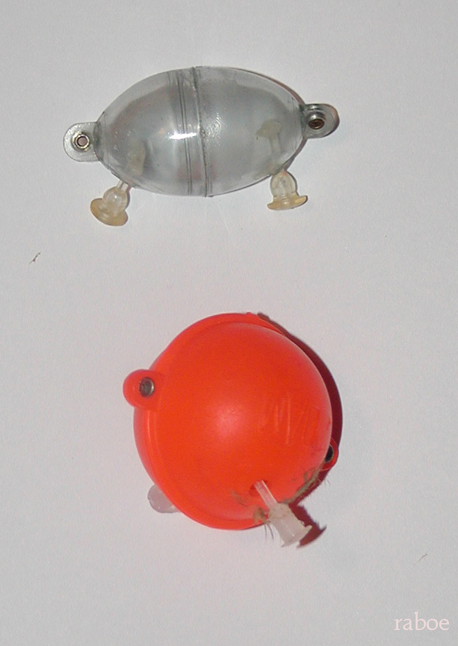 zwei verschiedenen Wasserkugeln